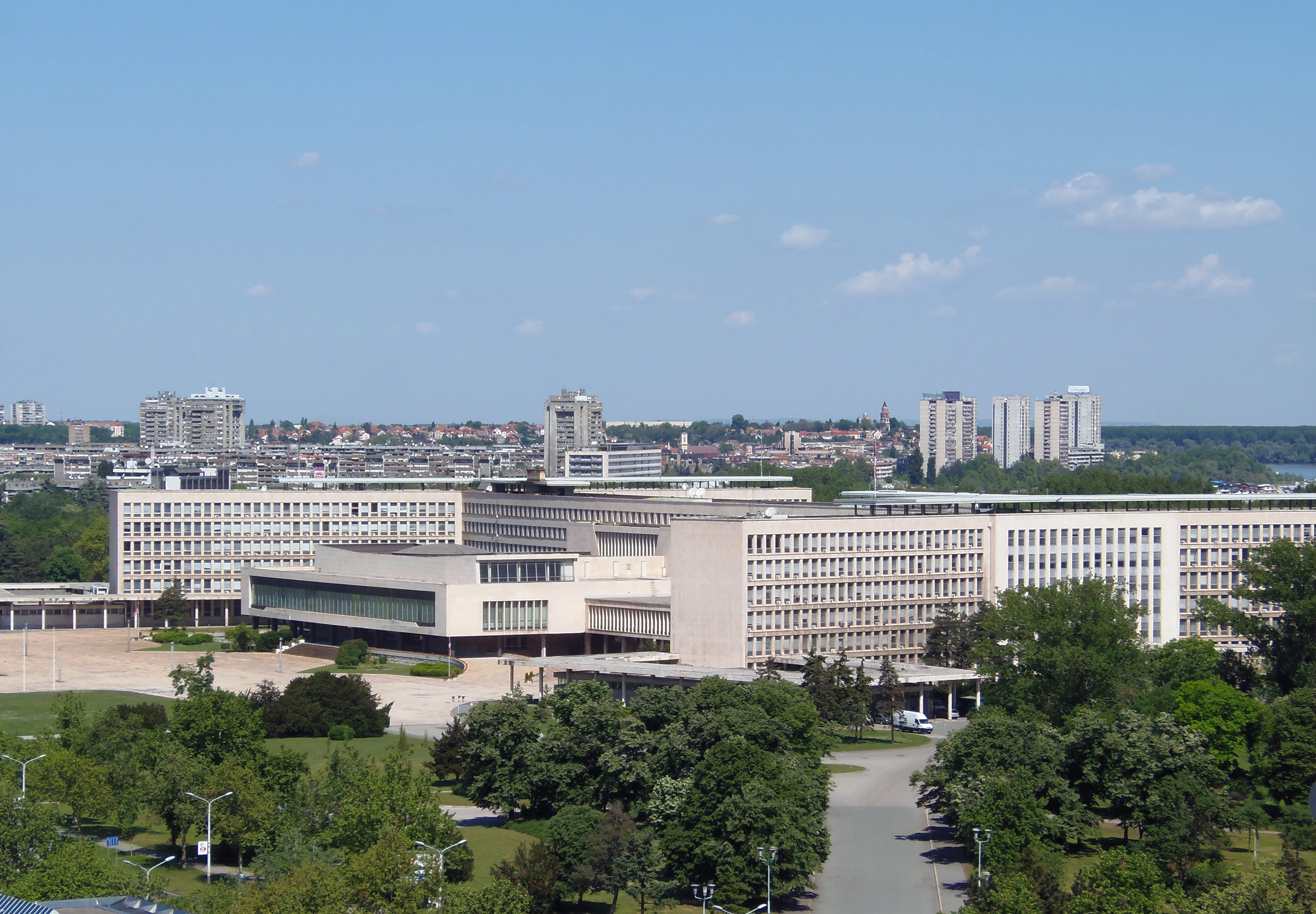 Палата "Србија", 6.маја 2012, други кадар.